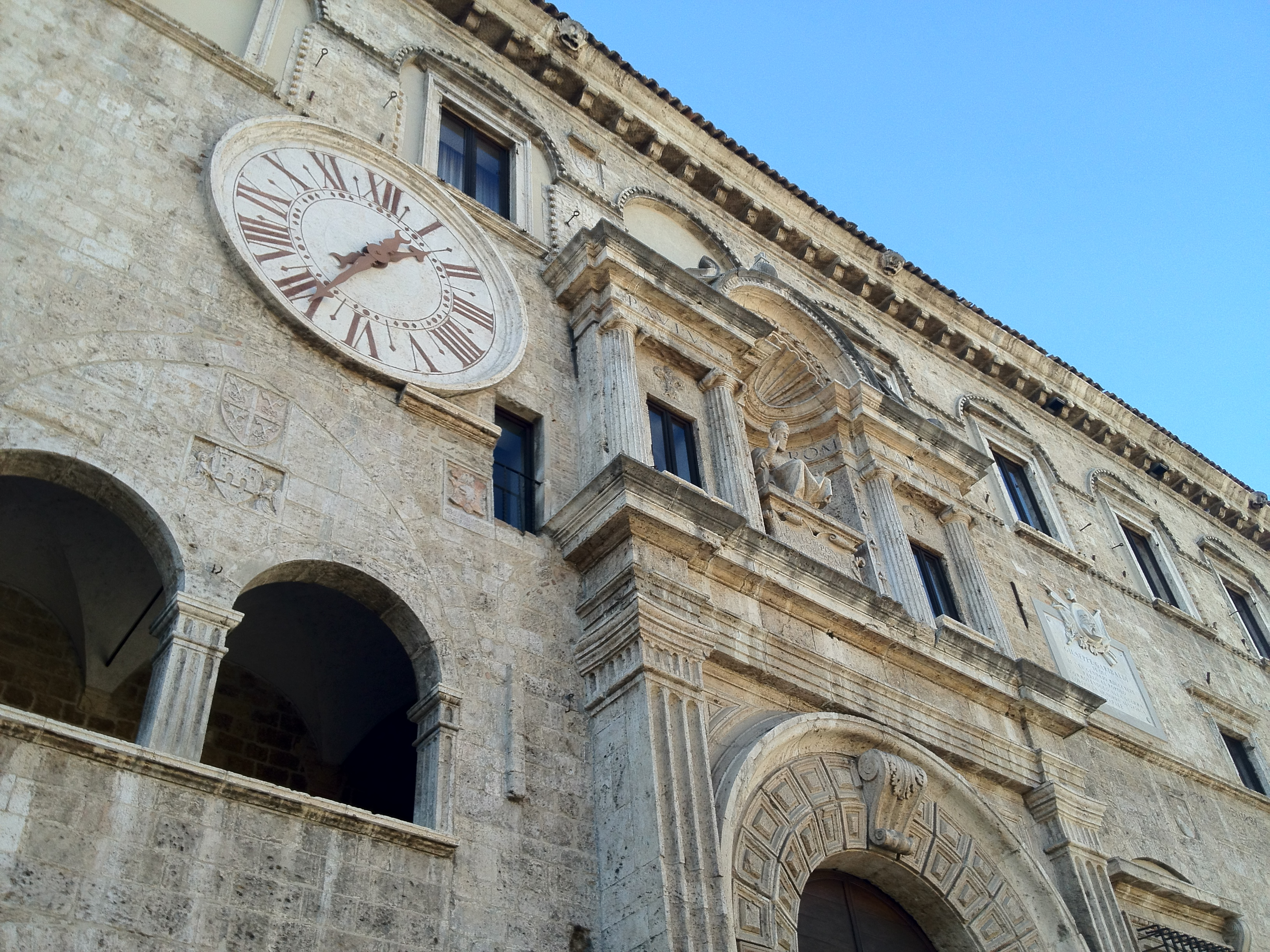 Palazzo dei Capitani del Popolo - Ascoli Piceno